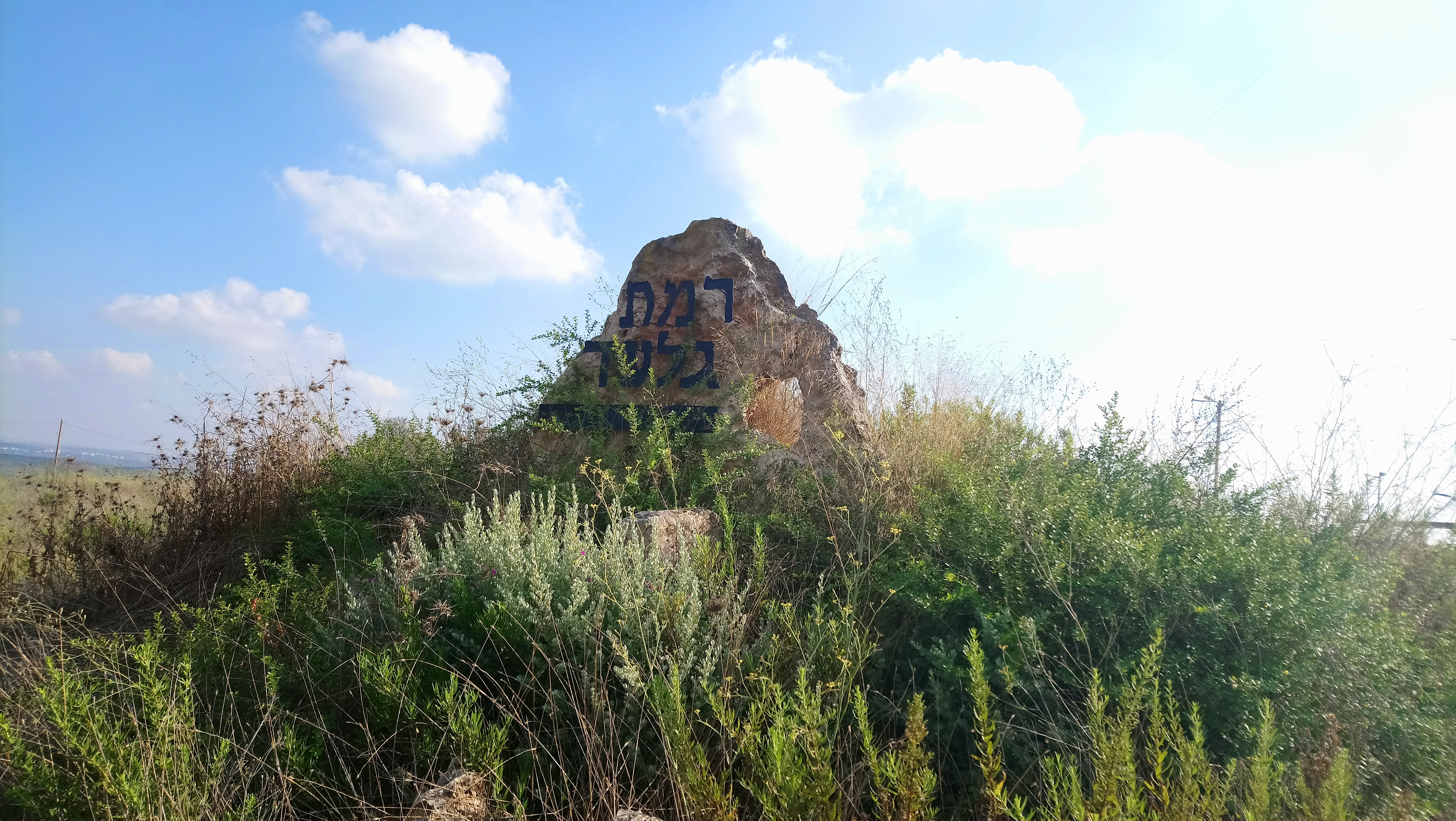 הכניסה לרמת גלעד. 2019